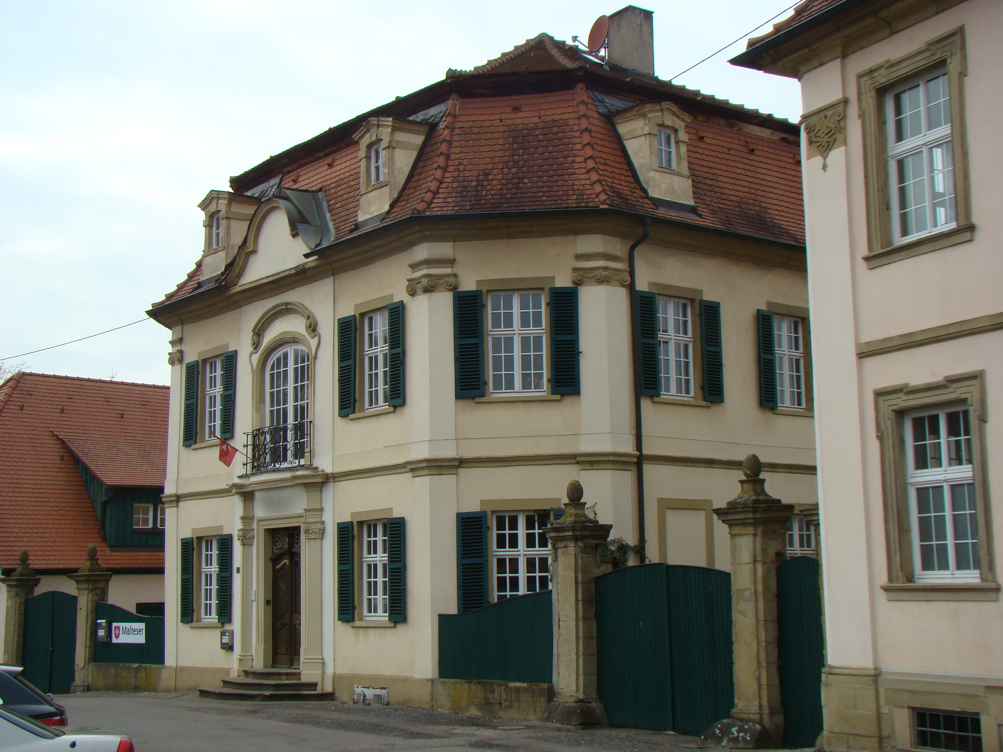 Gebäude des ehem. Stift Wimpfen, ehem. Kustodie, Lindenplatz 4